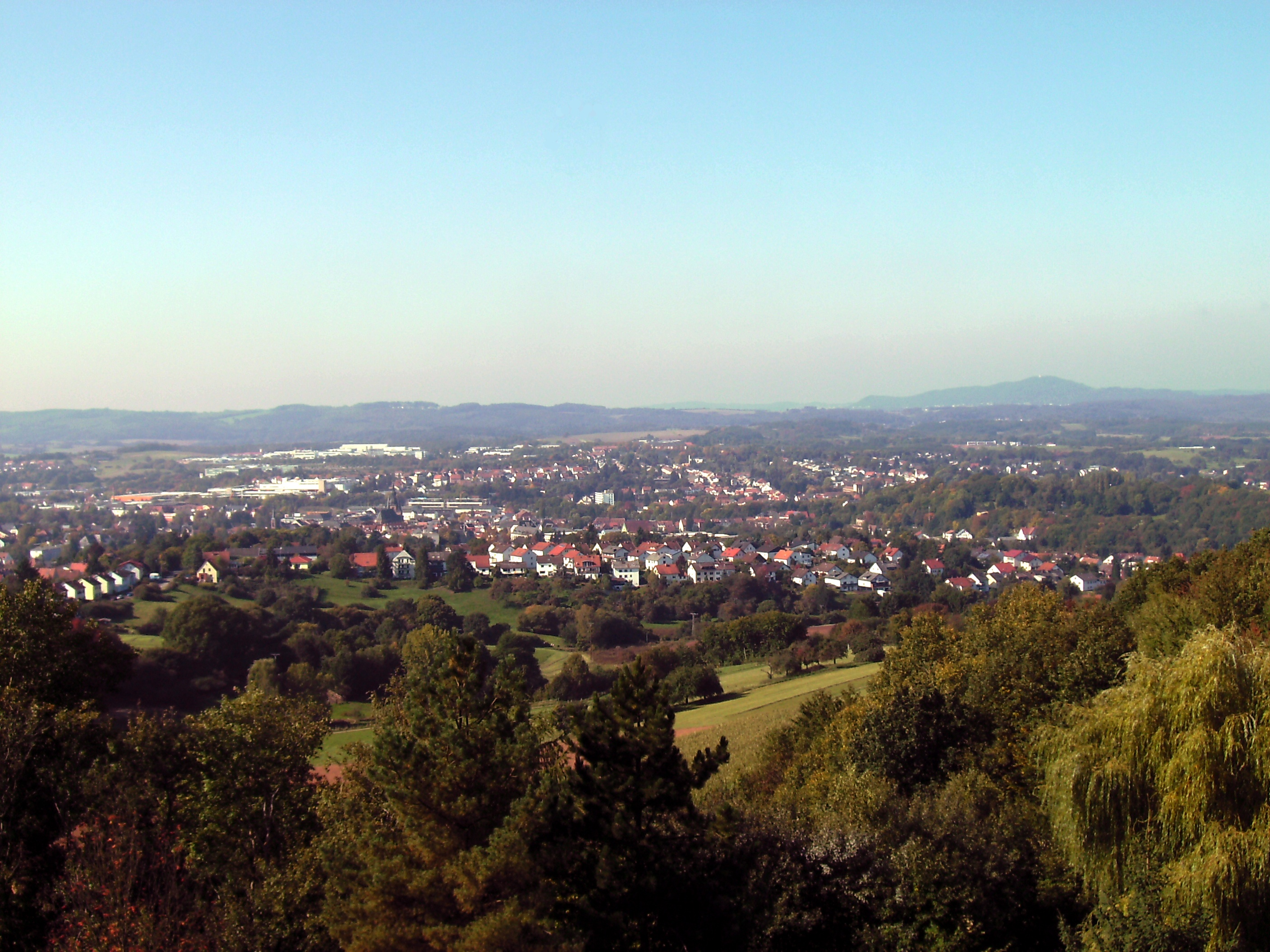 St. Wendel: Gesamtansicht mit Schaumberg im Hintergrund